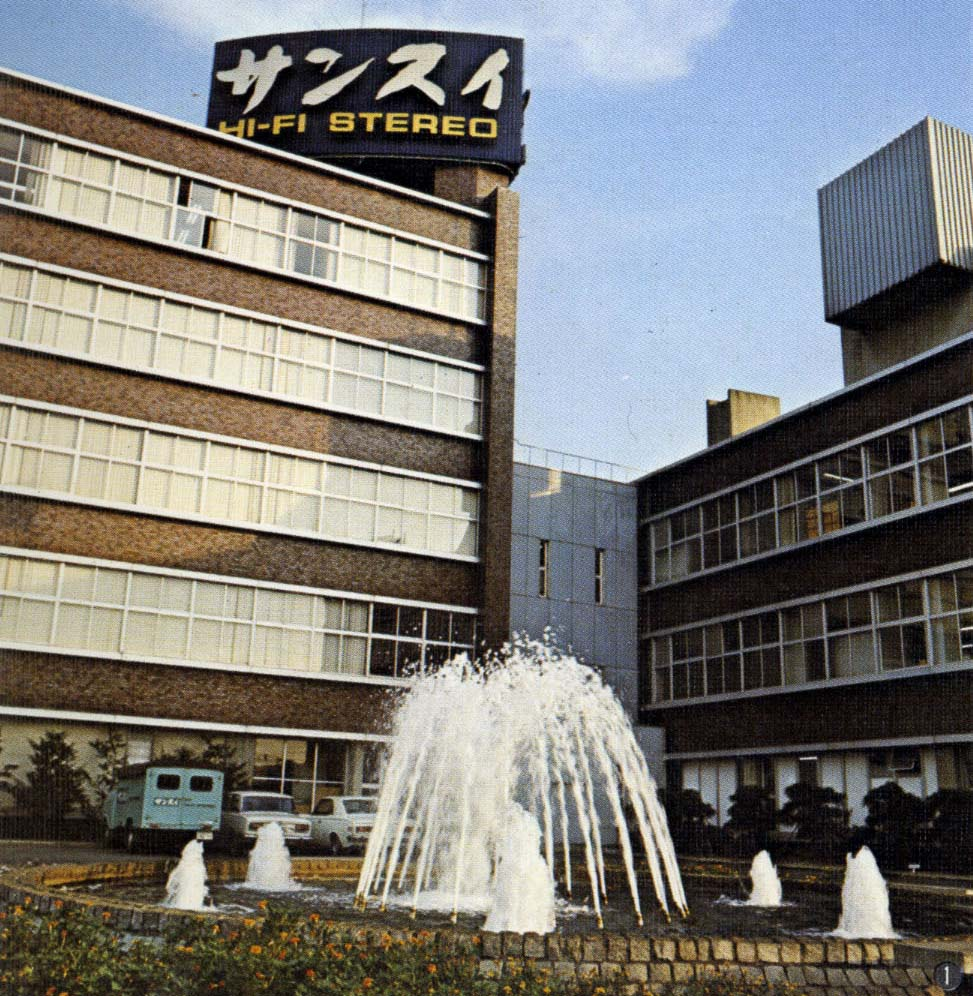 Siège social de Sansui dans les années 60 et 70 à Suginami